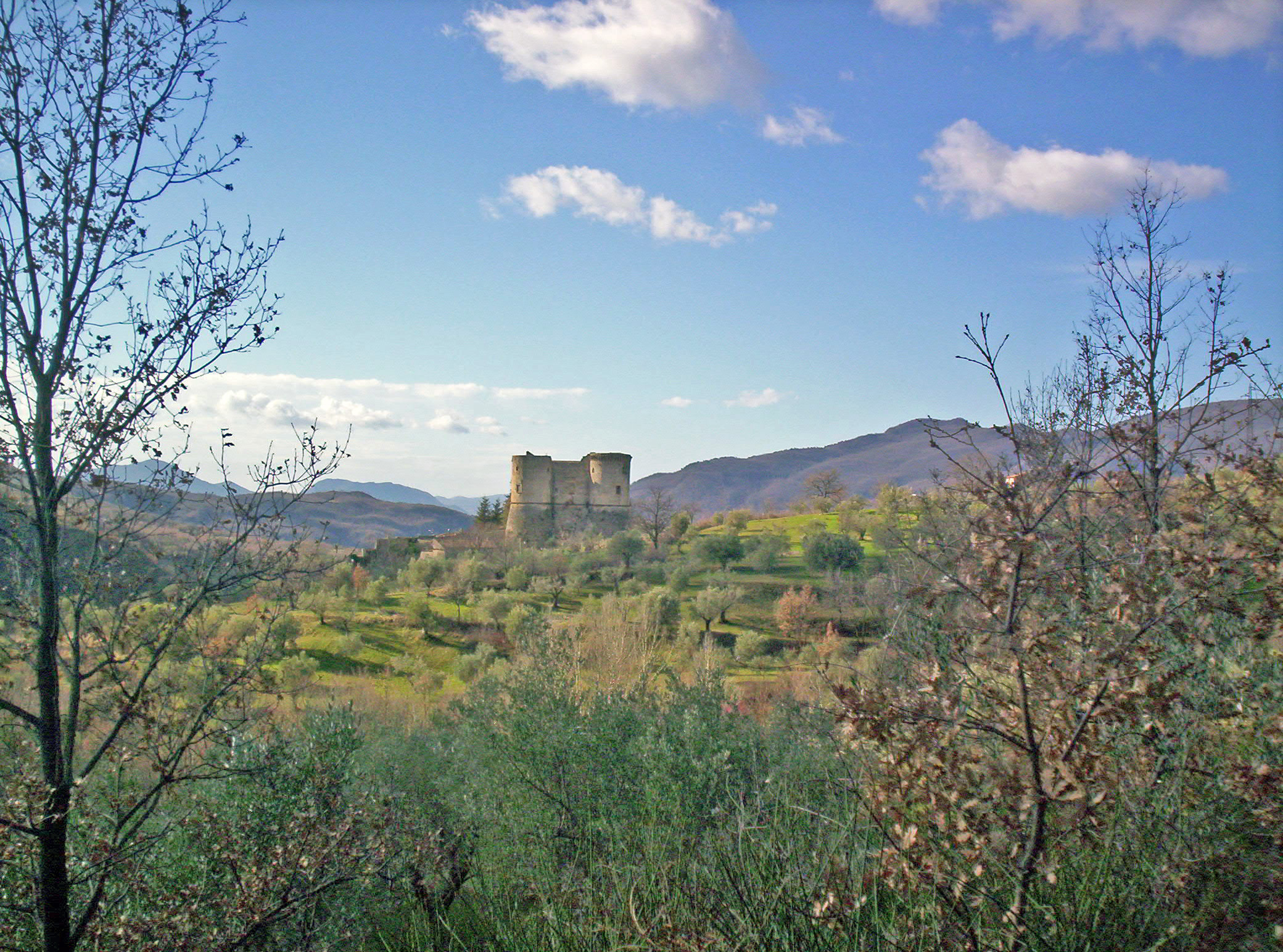 Castello medievale sito in Prata Sannita (CE), Italia. Vista dalla strada comunale che porta alla ex centrale idroelettrica.